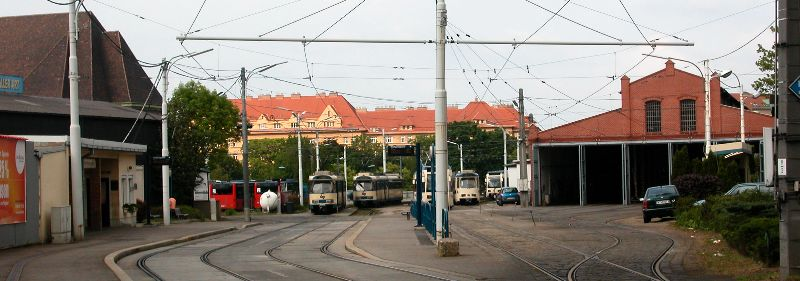 Bahnhof Wolfganggasse der Wiener Lokalbahnen